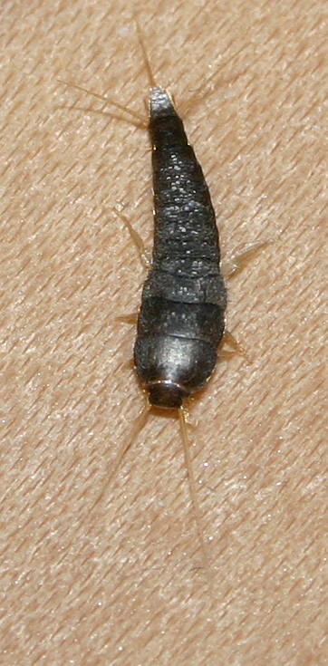 Silberfischchen, Lepisma saccharina